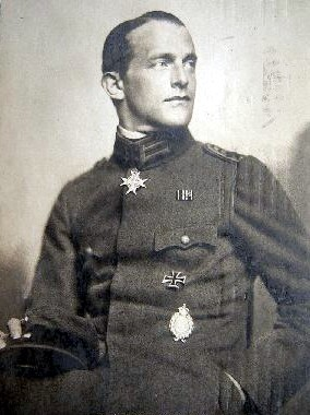 Foto des deutschen Jagdfliegers Karl Menckhoff von Nicola Perscheid.